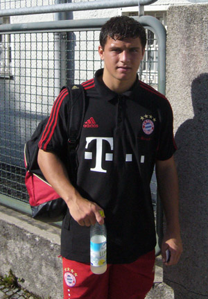 Dale Jennings